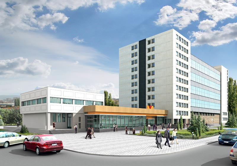 Архитектурна визуализация на бизнес комплекс „Елена“ в Перник, включващ хотел „Елит“ (на преден план) и Европейския политехнически университет (най-вдясно)